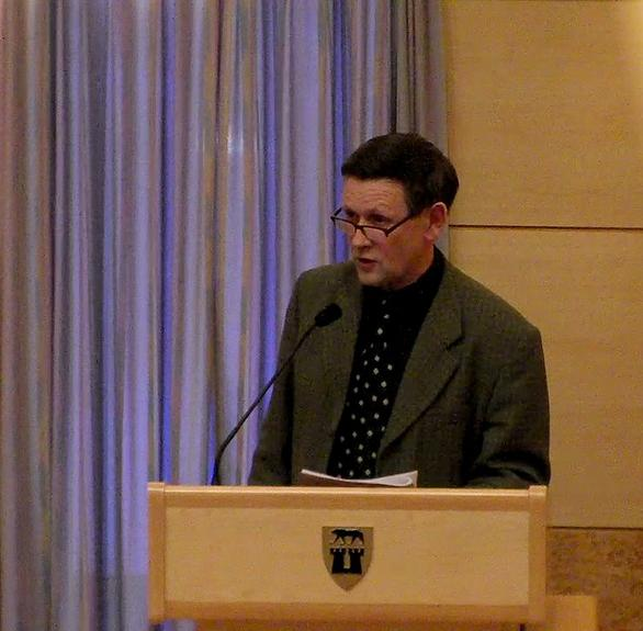 Bilde av Annar Hasle som er gruppeleder for KrF i Sarpsborg bystyre